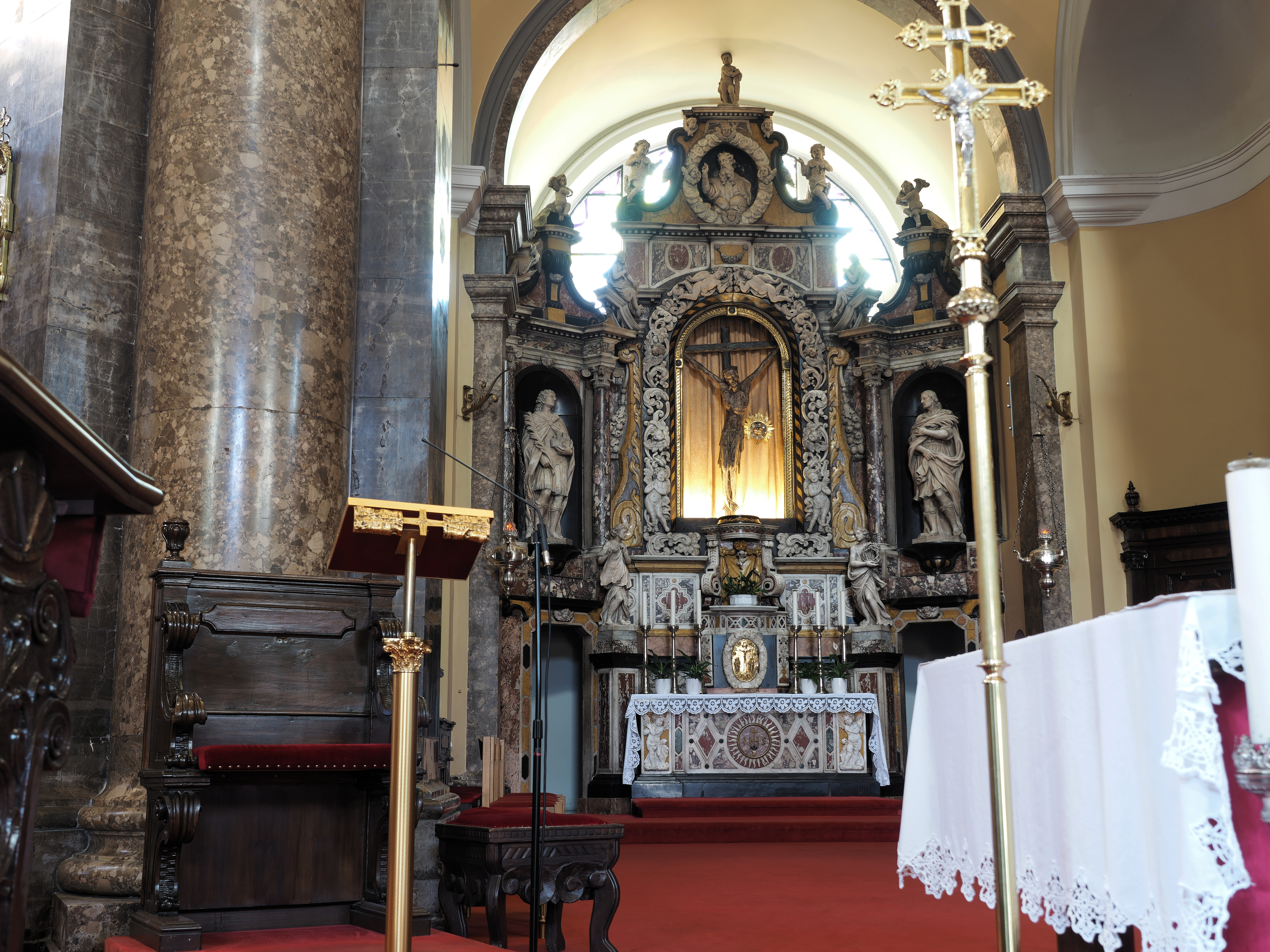 Altar in etwas seitlicher Ansicht im Dom Sankt Vitus in Rijeka, Kroatien